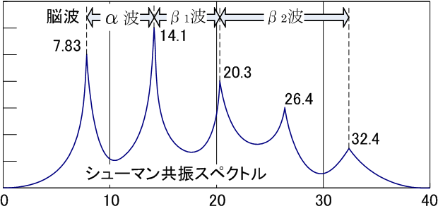 ??:Neotesla